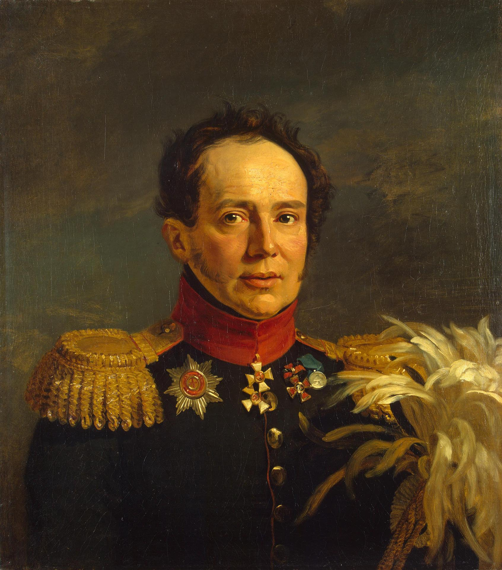 Nikolay Semyonovich Sulima (12.12.1777 – 21.10.1840) russian general